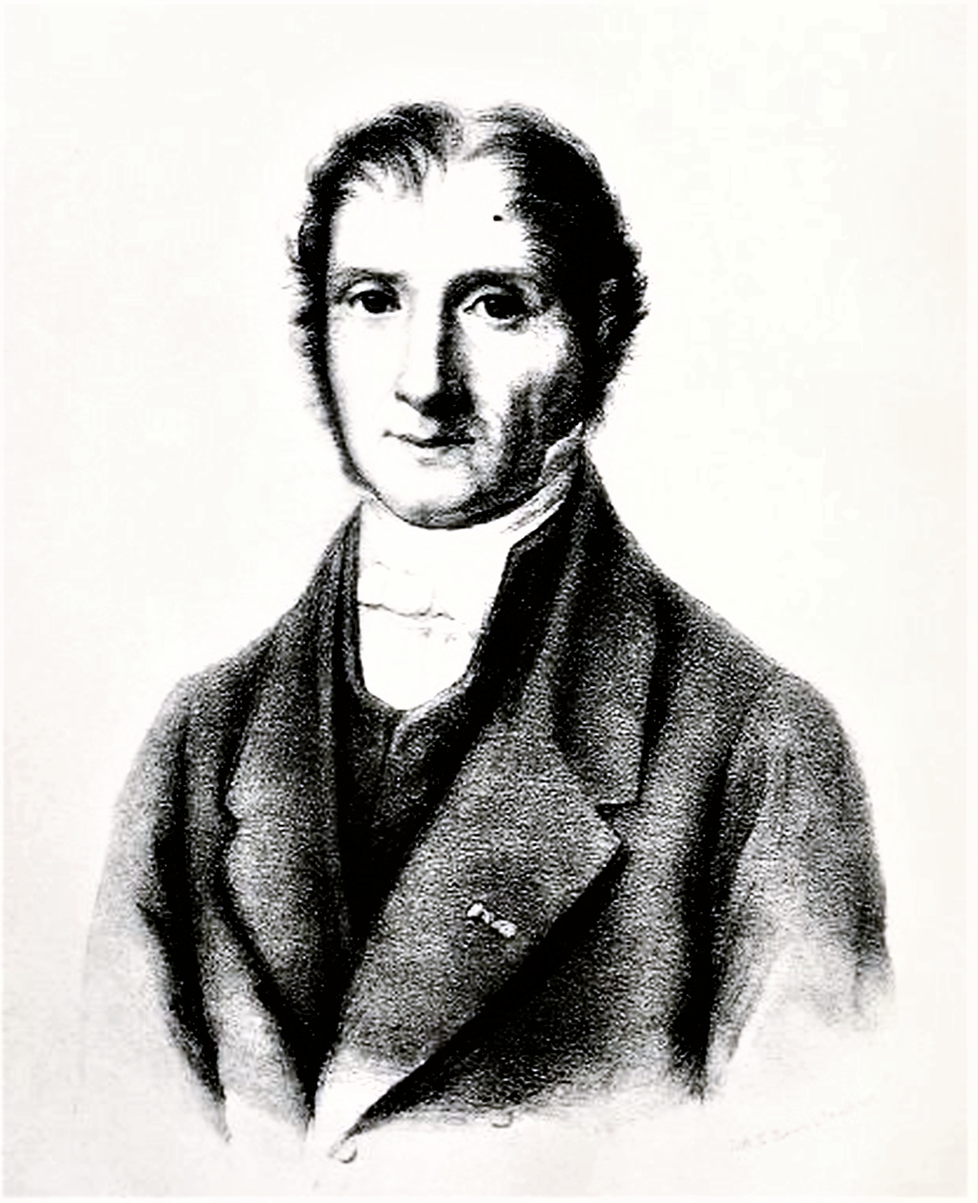 Jean-Baptiste Mougeot (1776-1858)